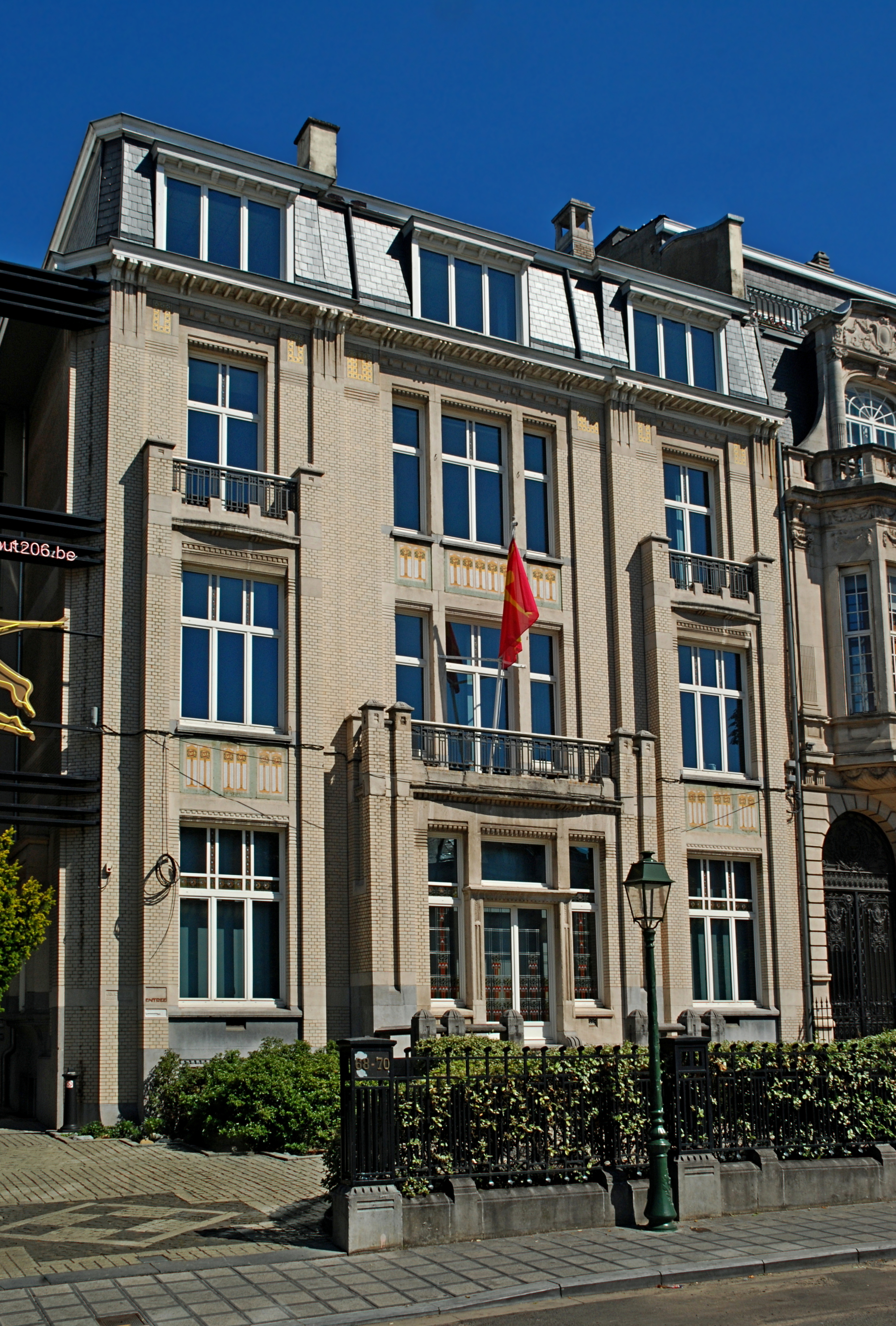 Belgique - Bruxelles - Ancien Institut pour le traitement des maladies des yeux du docteur Coppez (Art nouveau, architecte Jean-Baptiste Dewin, 1912)